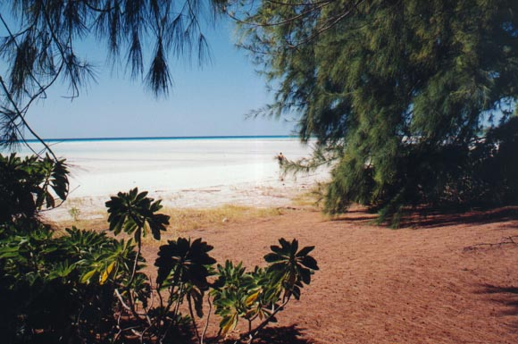 Vue sur la plage de Juan de Nova depuis le sous-bois